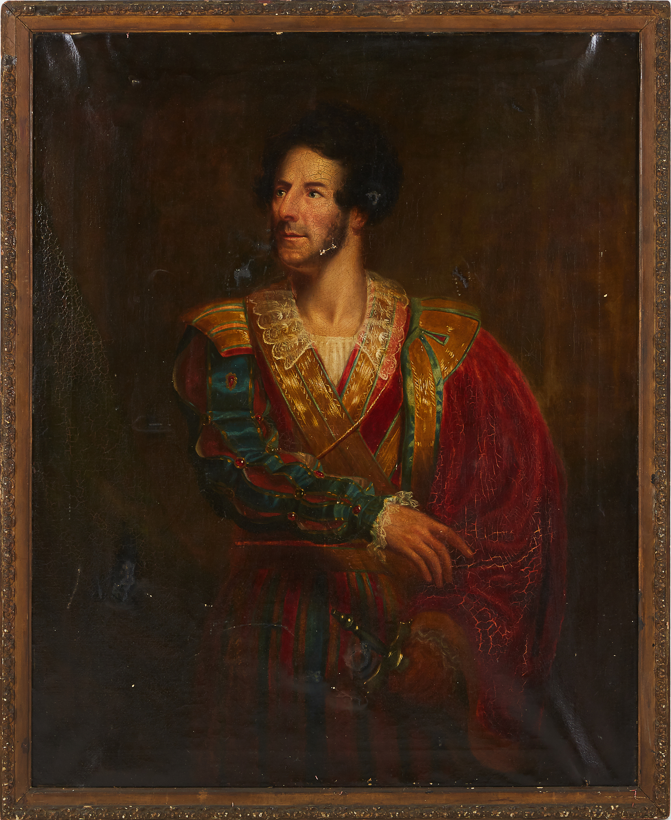 Porträtt av skådespelaren John Langford Pritchard (1799-1850), avporträtterad 1829 i rollen som Don Felix i skådespelet "The Wonder". Av okänd konstnär.